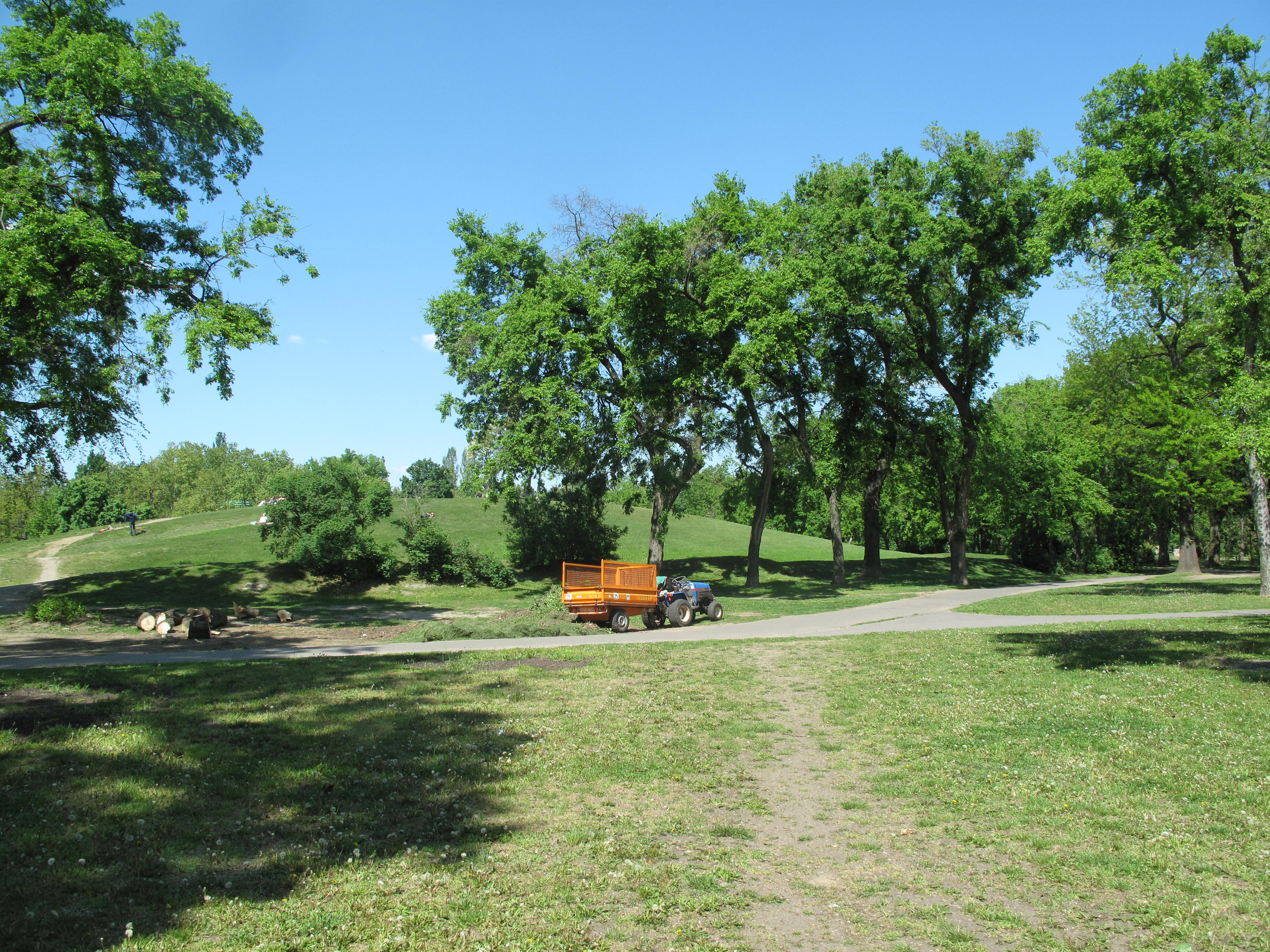 Budapešť